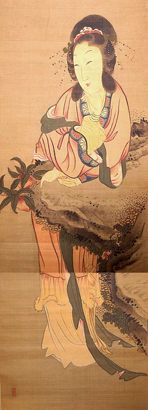 作者未詳（「閒山」筆）『西王母図』（美人画：中国伝説上の人物）絹本 34.5x101.2